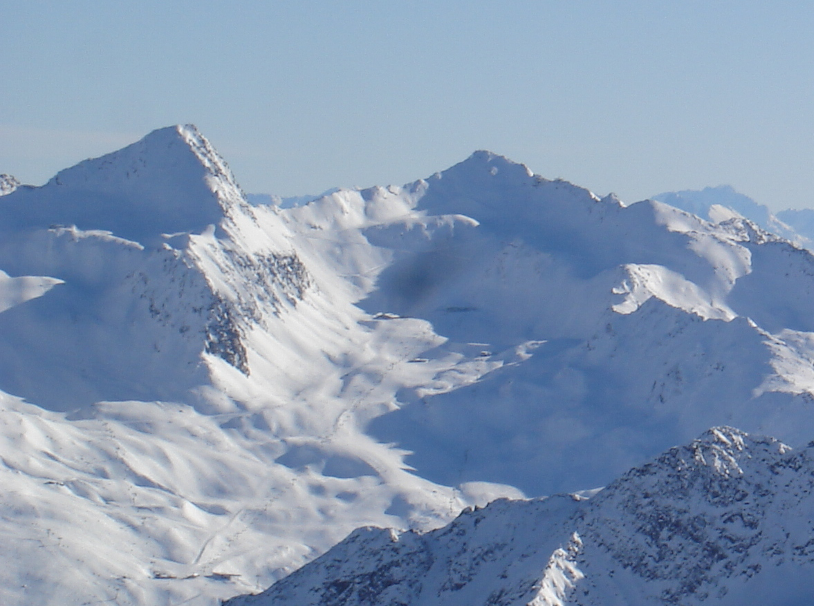 Blick vom Gipfel des Gaislachkogels (Gemeinde Sölden, Tirol) nach Südosten auf Schermerspitze und Wurmkogel (v.l.n.r), rechts dahinter Marmolata